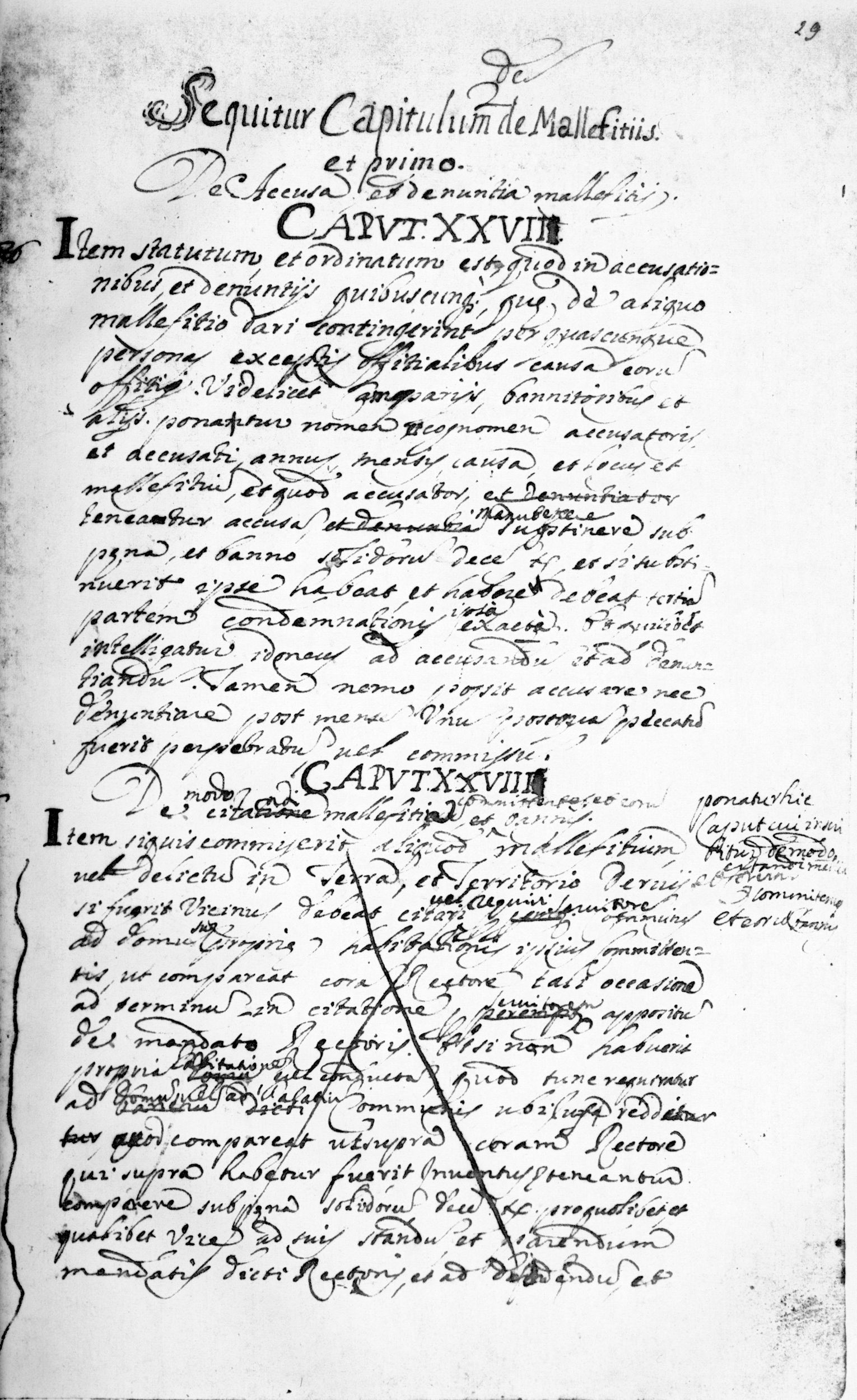 Statuta comunis Dervii